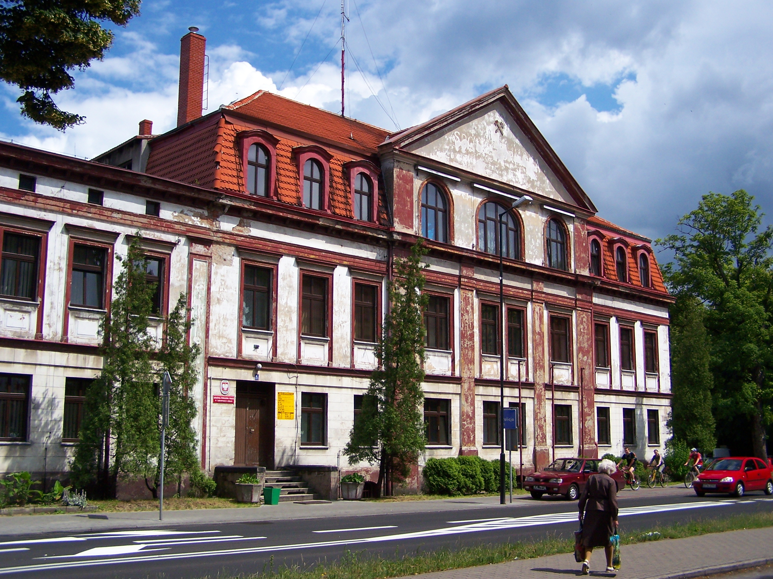 Budynek Policji w Tarnowskich Górach.